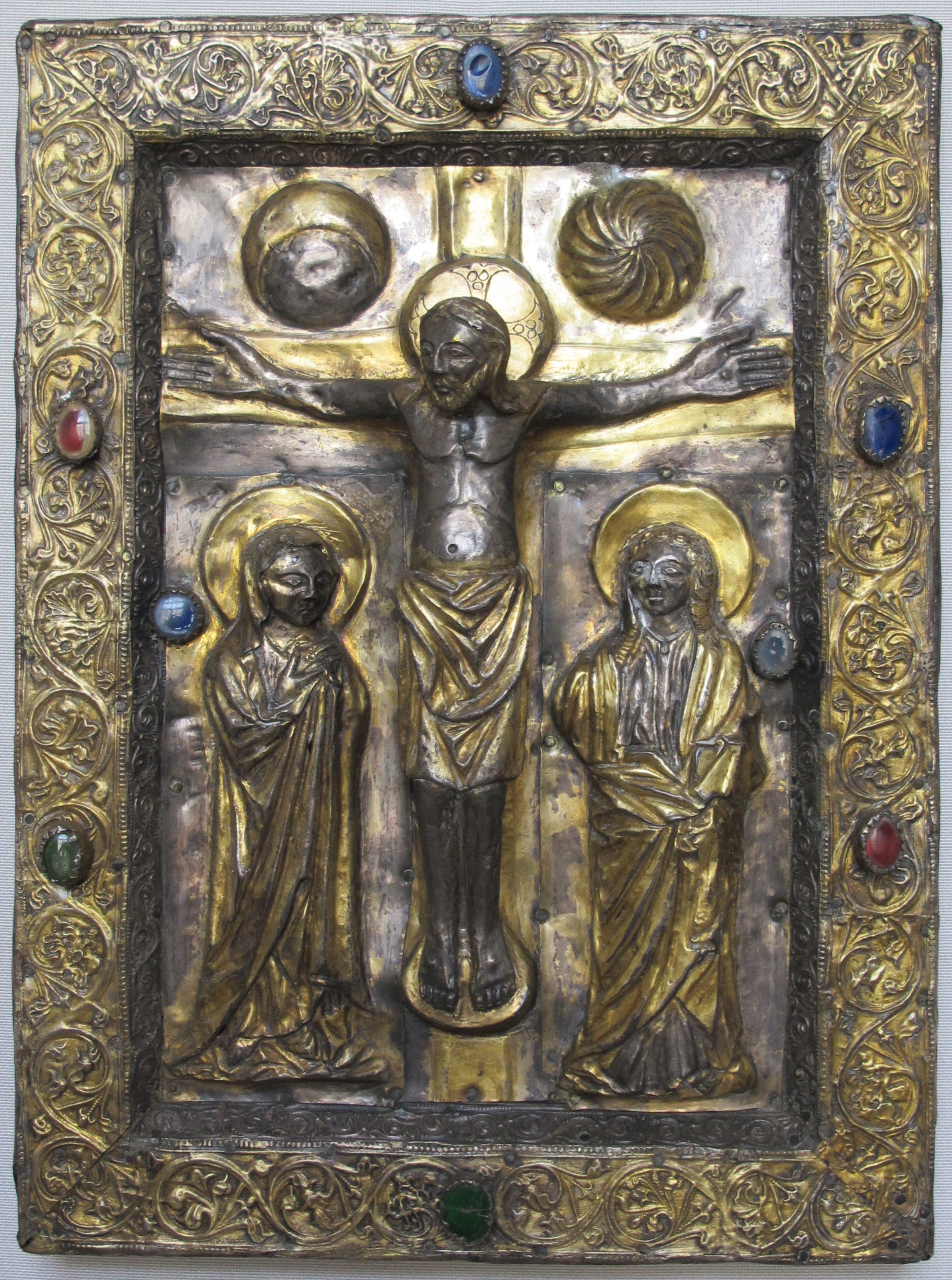 Coperta di evangeliario, italia, inizio xiii sec